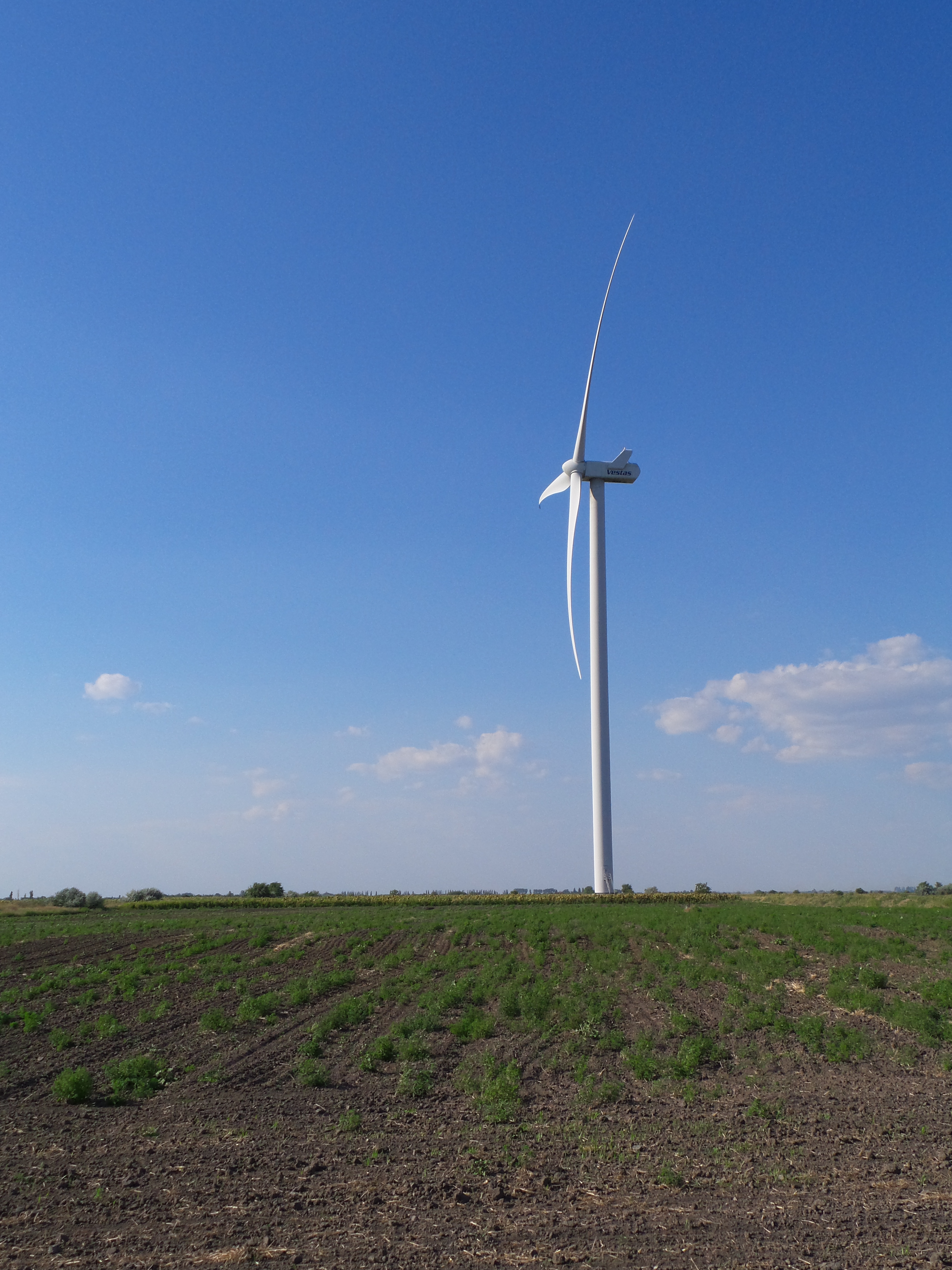 Вітрова електростанція у с. Новоросійське Скадовського району Херсонської області. 2016 р.